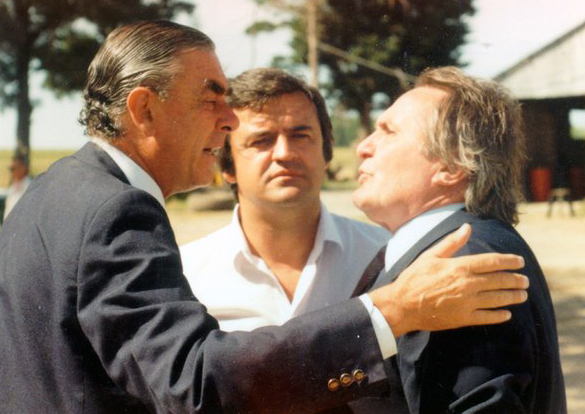 Los Dres. Alberto Volonté Berro, Jorge Washington Larrañaga Fraga y Mario Carminatti. Cortesía del Usuario:Trek57.